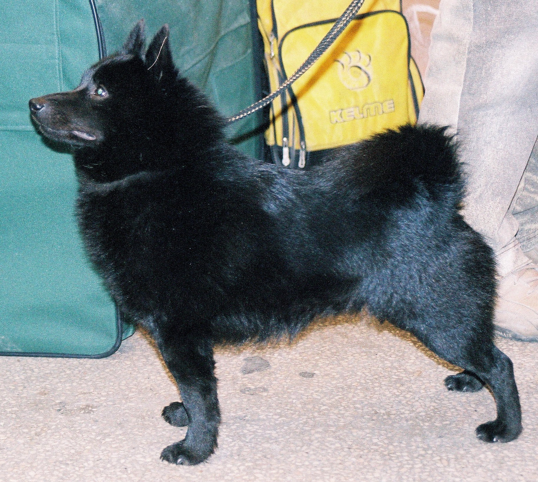 autor: Pleple2000 13:19, 5 April 2006 (UTC)